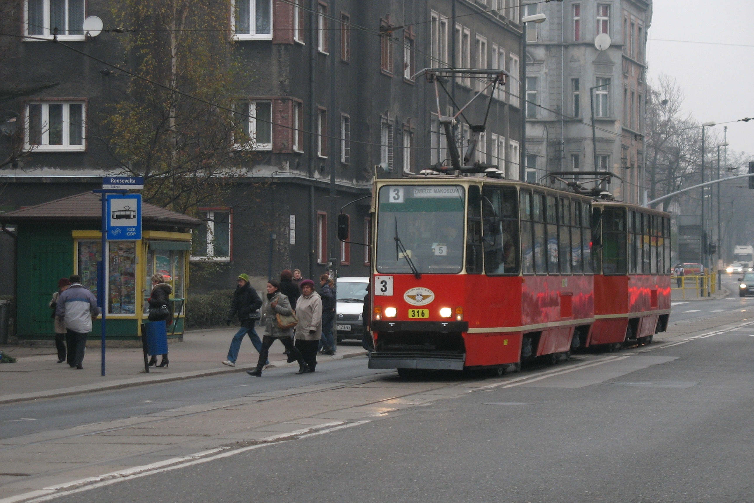 Tramwaj Konstal 105Na numer 316 (wyprodukowany w 1974 jako Konstal 105N) na ulicy 3 Maja w Zabrzu.